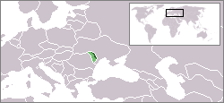 Locatie Transnistrië; aangepast van locatie Modavië; GFDL